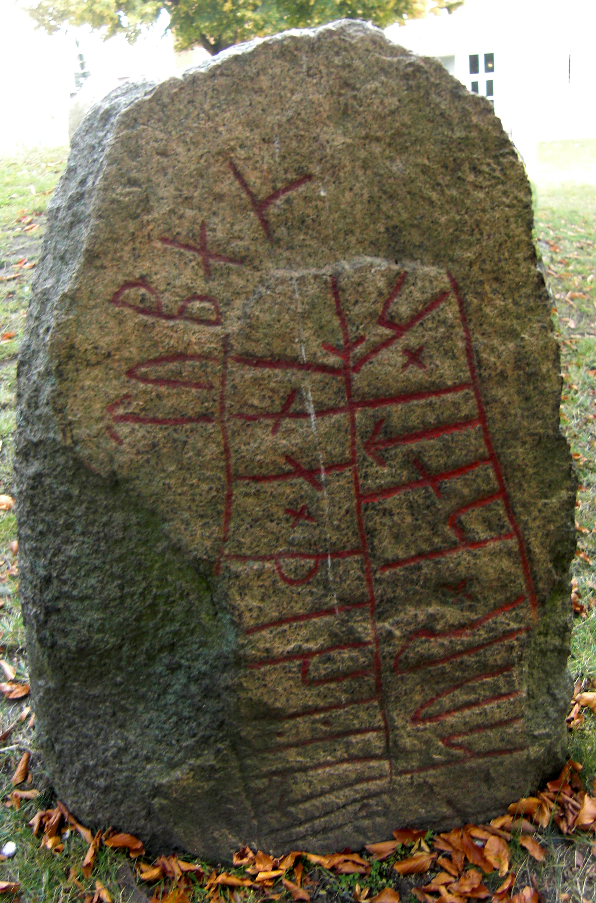 Gårdstångastenen DR 331 (Raä-nr Lund 9:3) är en runsten placerad vid Runstenshögen i Lundagård, Lund, Skåne, f.d. Danmark, Sverige.